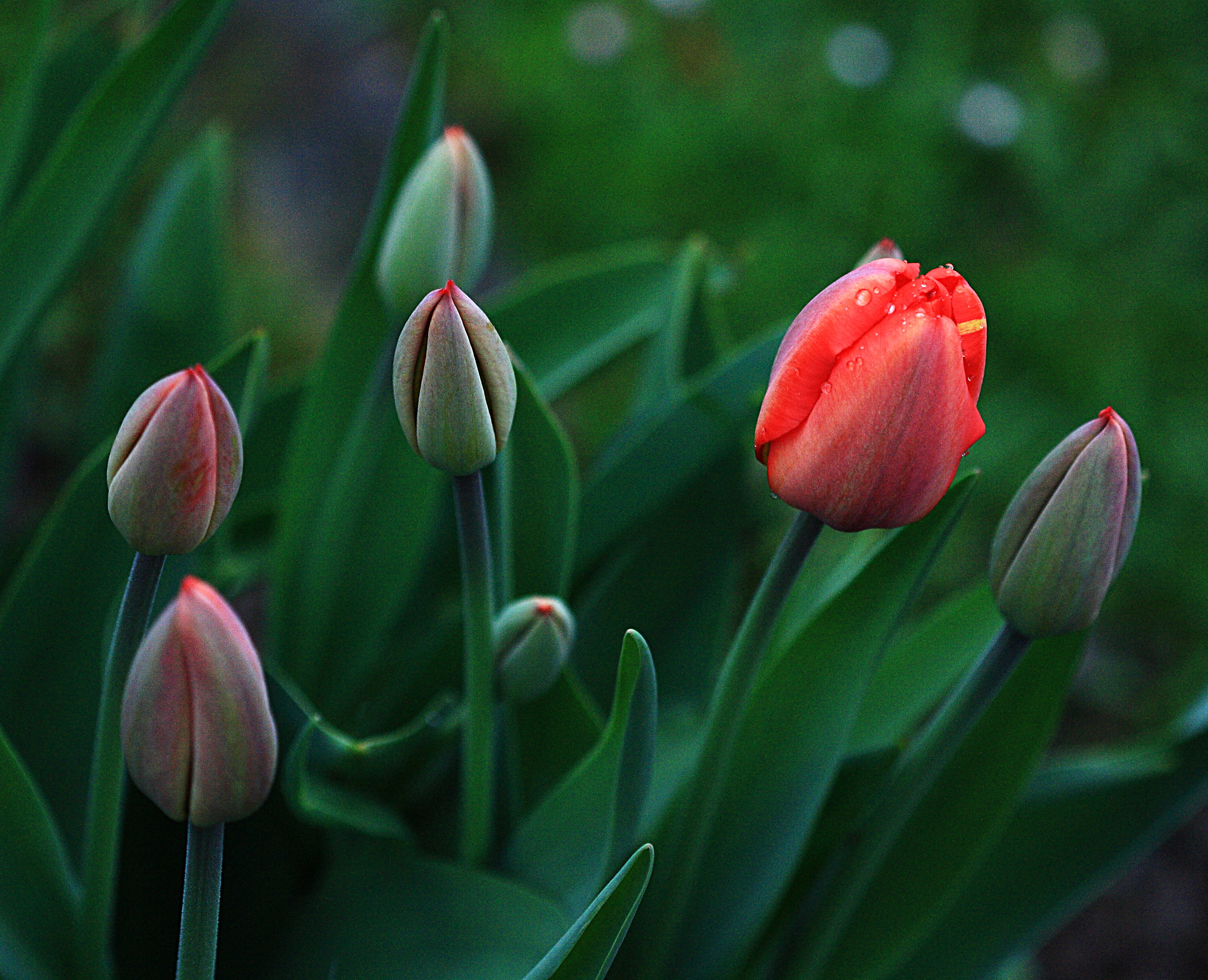 Tulpen im Regen